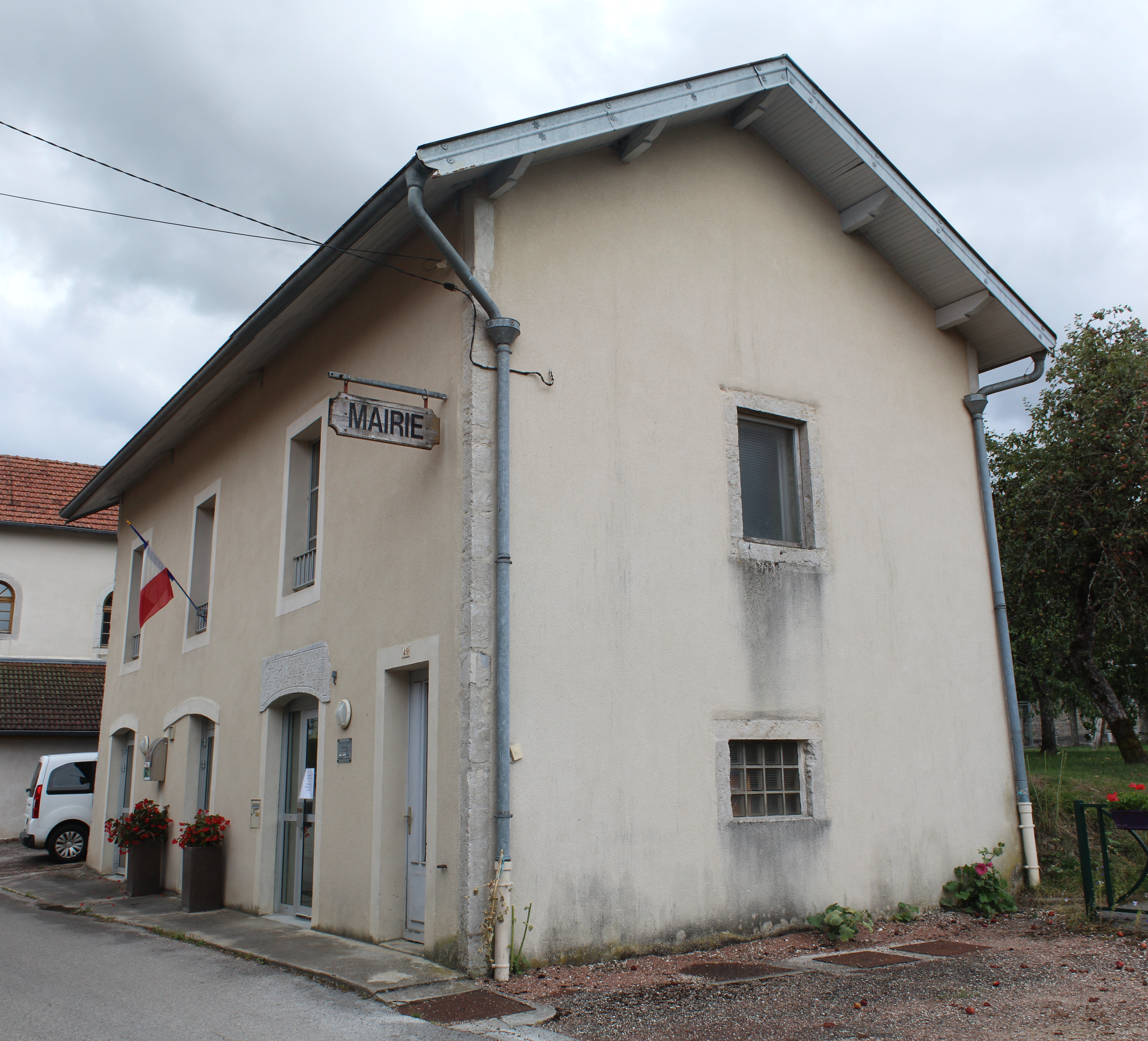 Mairie de Barésia-sur-l'Ain.